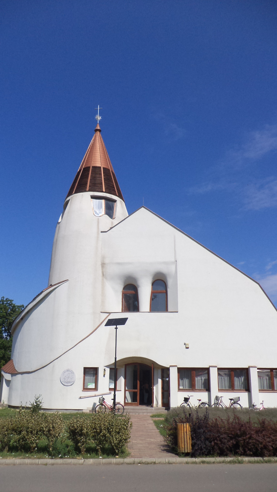 Hortobágy, Jó Pásztor ökumenikus templom